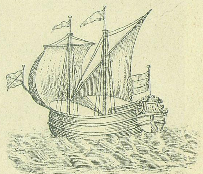 Флейт «Патриарх». 1704 год.